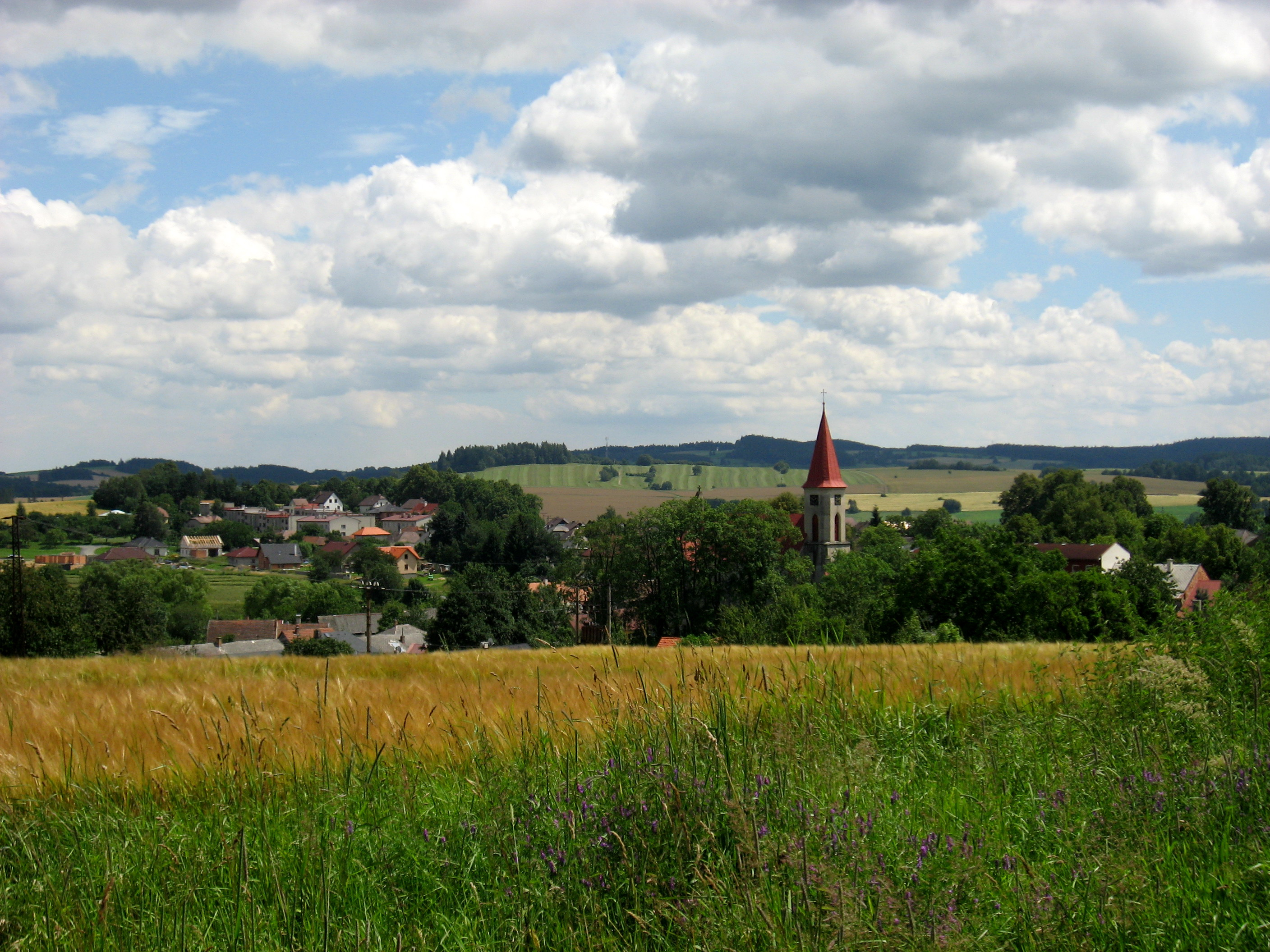 Herálec